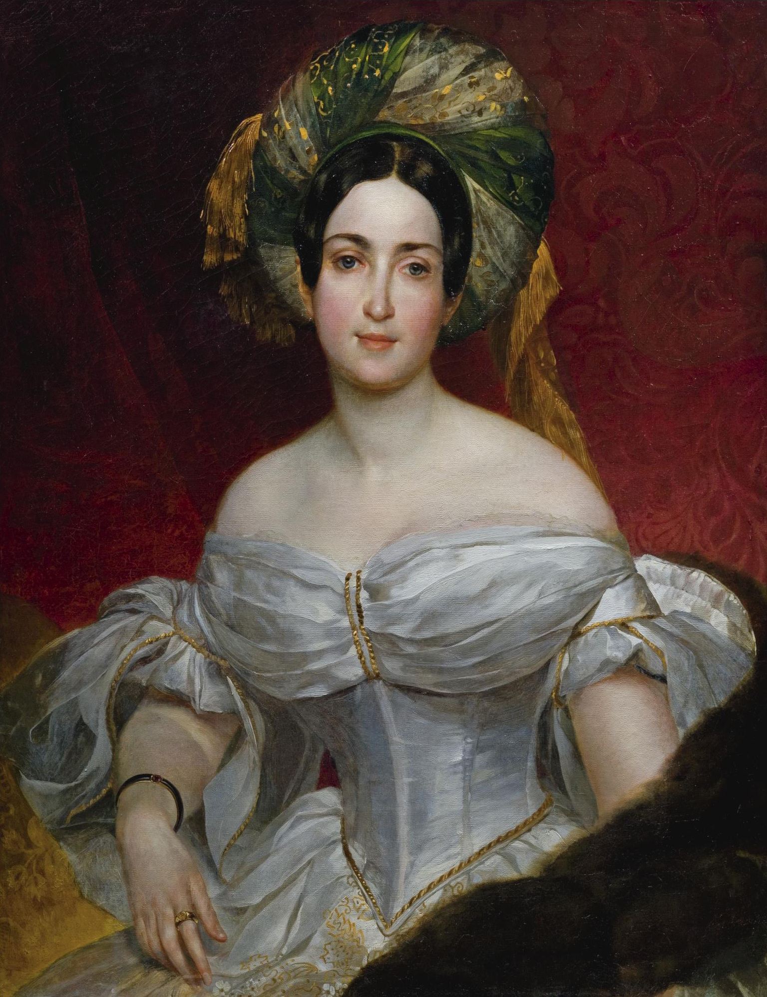 Portrait Aurora Karamzina (née Stjernvall) from the Constantine Palace in Strelna (formerly in the Rostropovich collection) Журнал: "Третьяковская галерея" "Шедевры русского искусства". Людмила Маркина. «РОКОВАЯ АВРОРА» история с продолжением Нажмите "редактировать" чтобы прочитать скрытый текст